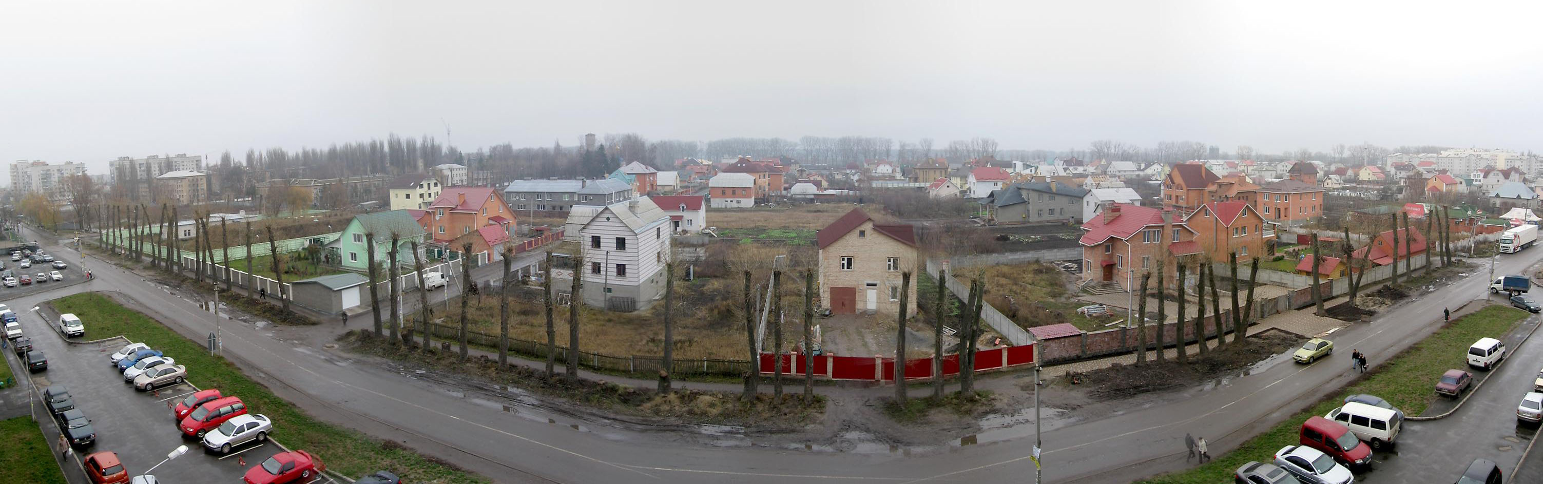 Вишневое